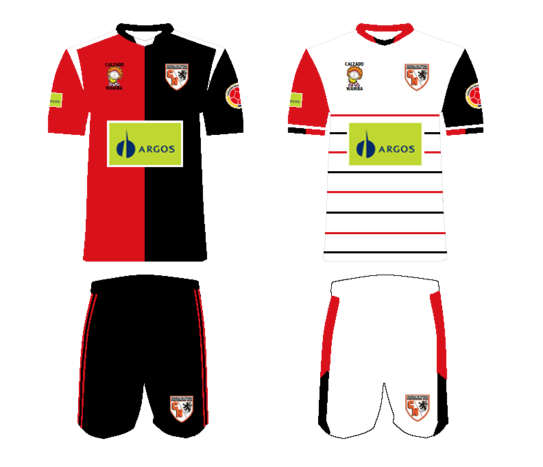 Equipación 1 y 2